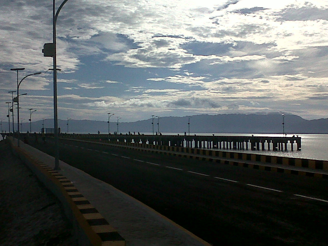 Le port de Raha, Sulawesi du Sud-Est, Indonésie